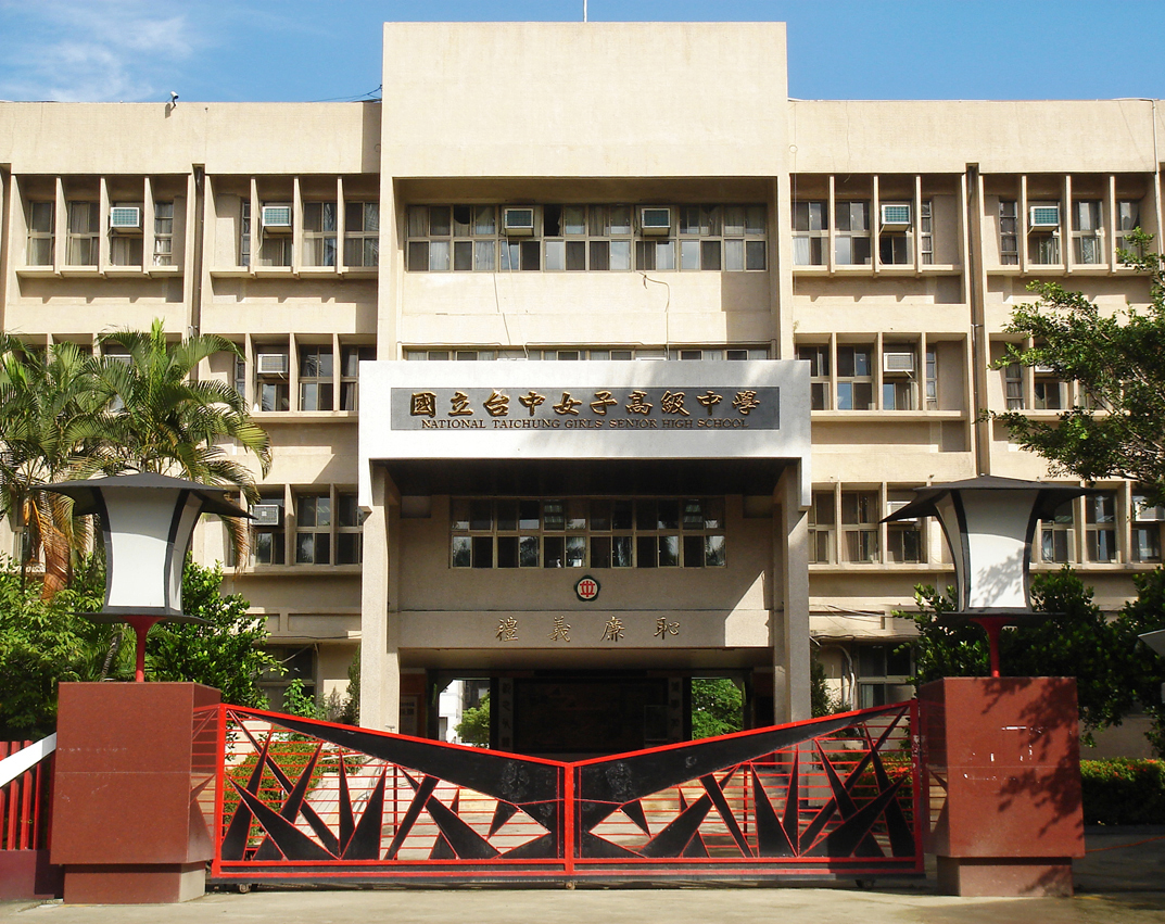 中文（台灣）: 國立臺中女子高級中學。